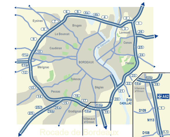 numéros échangeurs